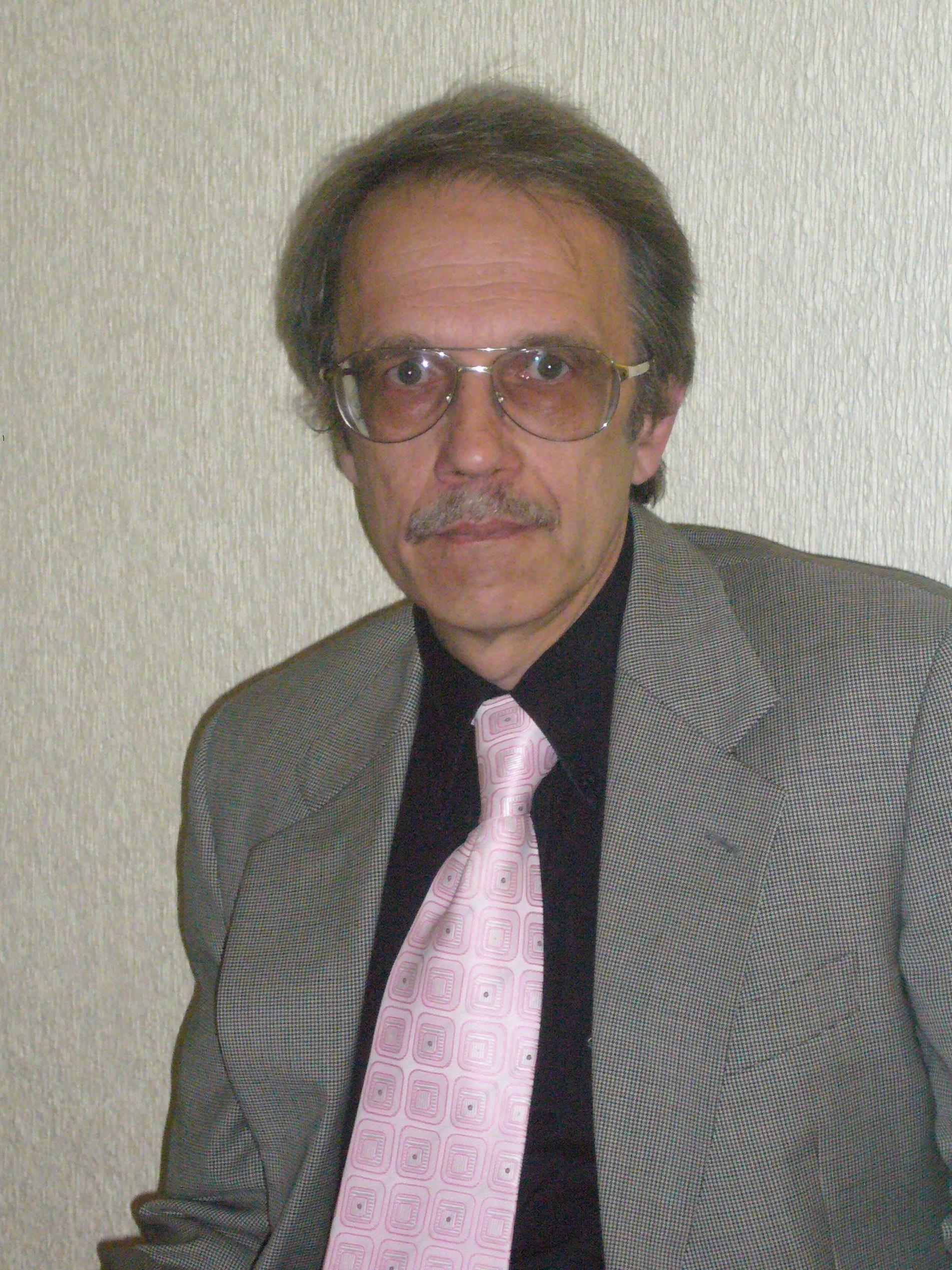 Foto de Alexander Balankin